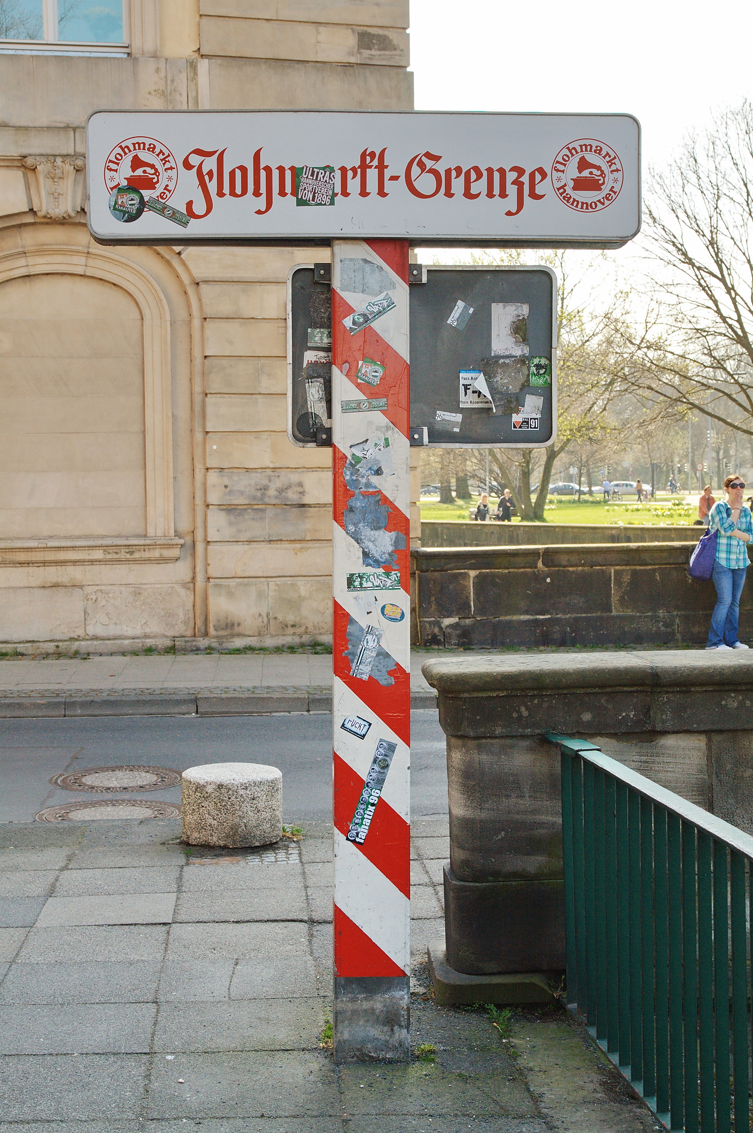 Flohmarkt am Hohen Ufer (Hannover), Niedersachsen, Deutschland